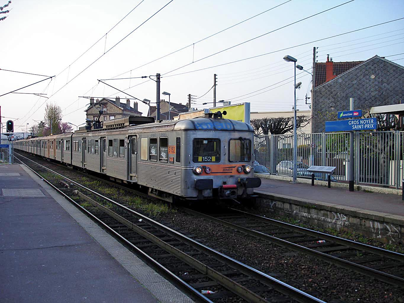 Z 6100 traversant haut-le-pied la gare du Gros Noyer - Saint-Prix à Ermont (Val-d'Oise), France.